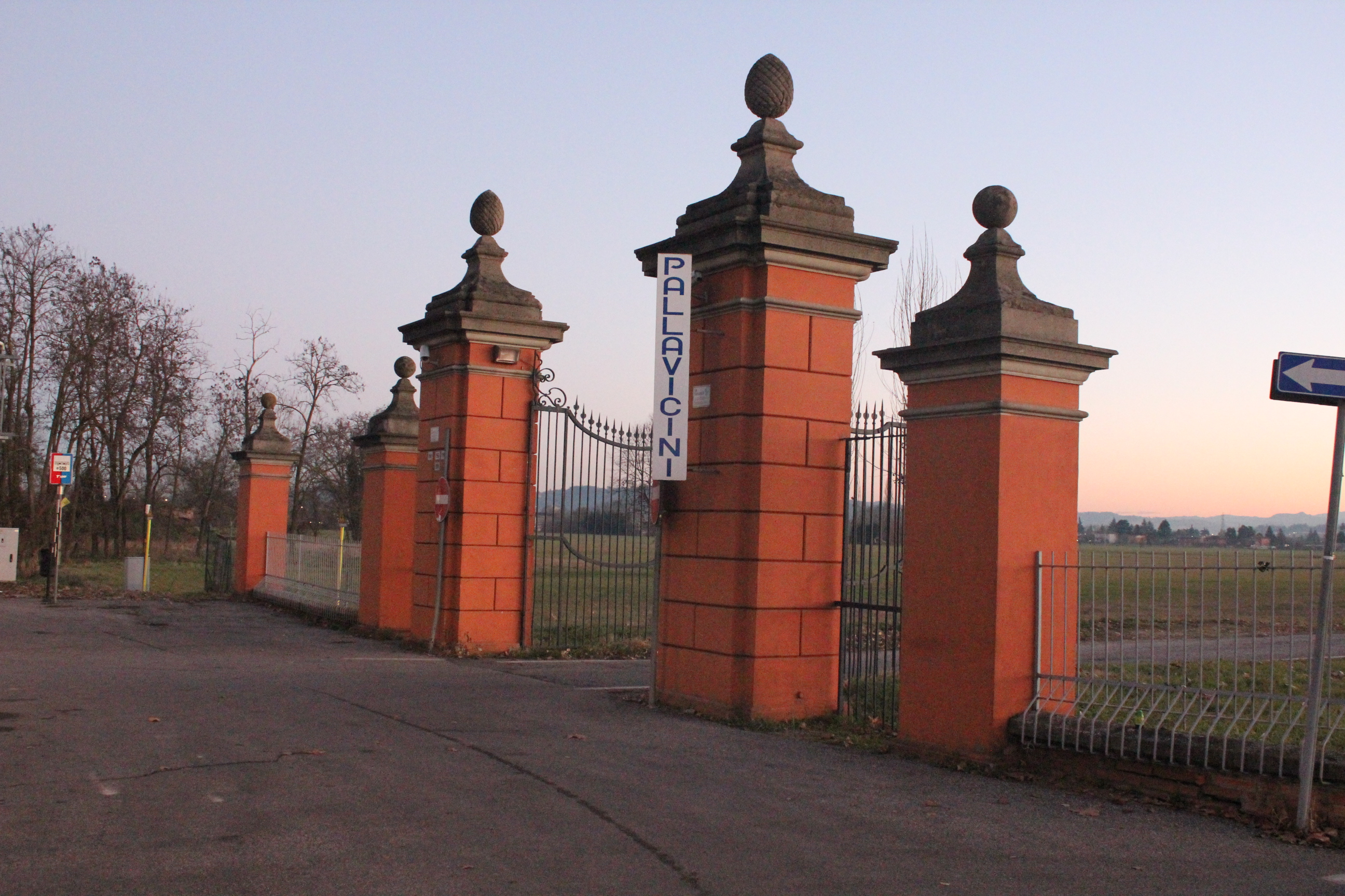 Cancello di ingresso del viale della Villa Pallavicini a Borgo Panigale, Bologna, Italy